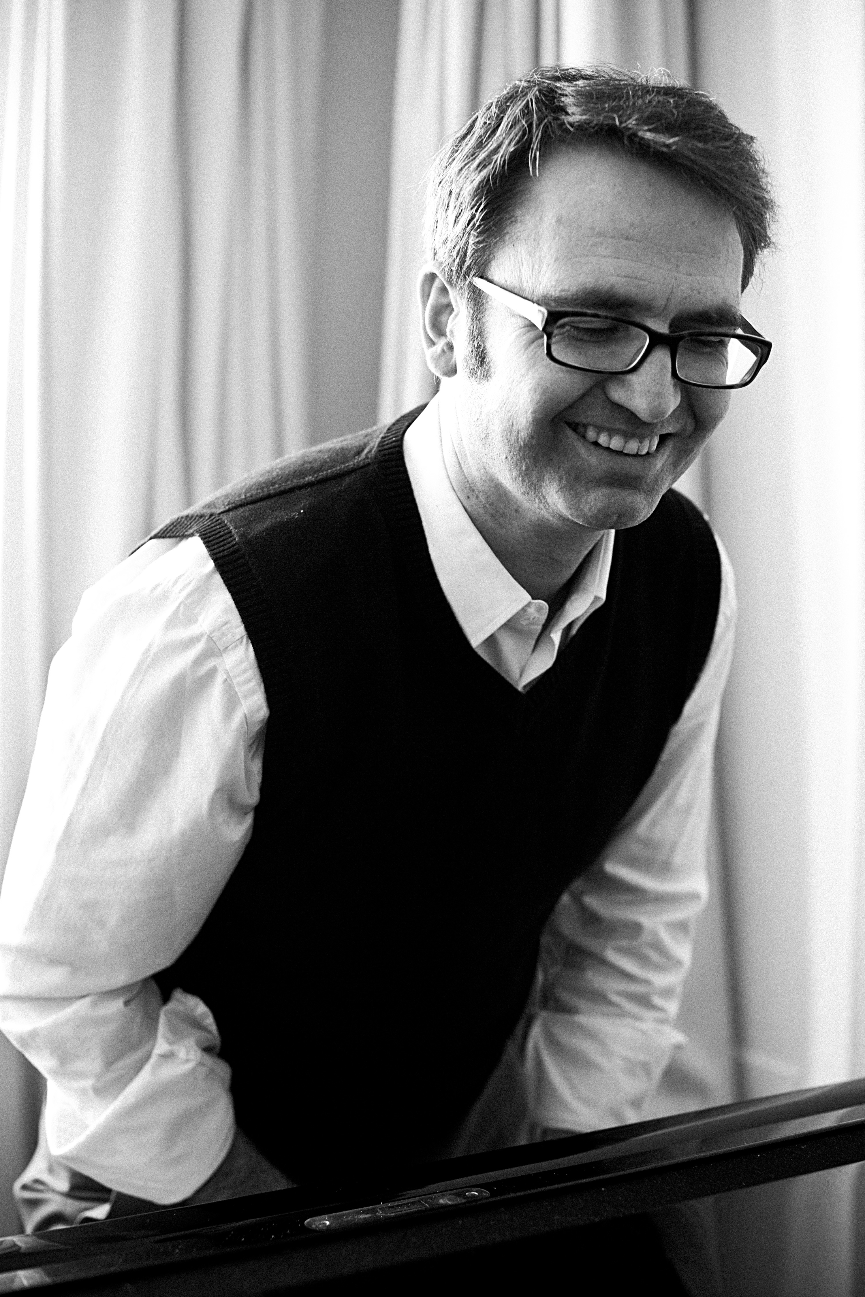 Henning Schmiedt 2012 (Foto: Fabian Stürtz)